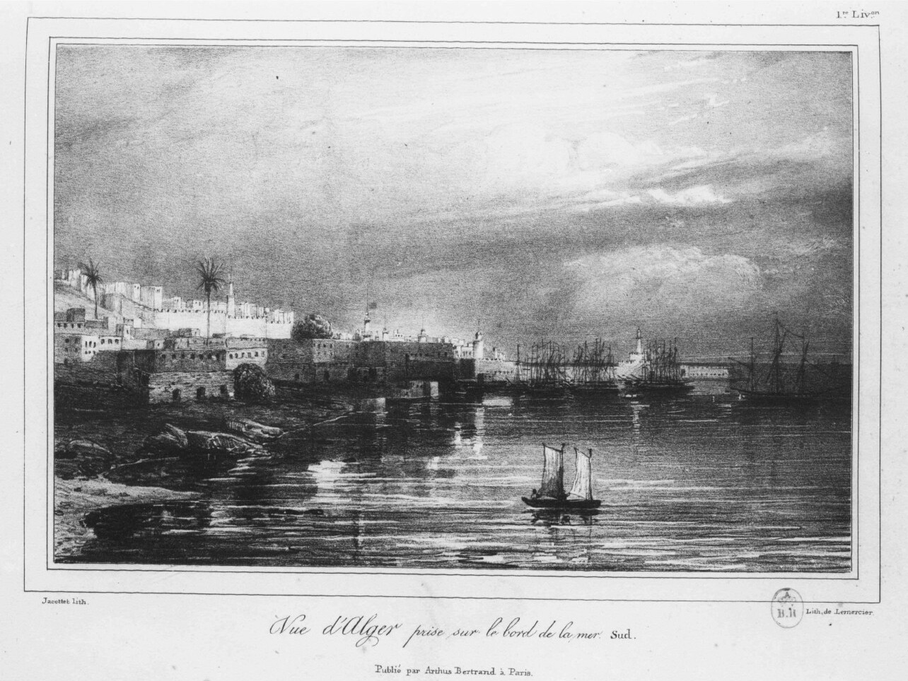 Titre : Voyage dans la régence d'Alger, ou Description du pays occupé par l'armée française en Afrique : contenant des observations sur la géographie physique, la géologie, la météorologie,... : suivies de détails sur le commerce l'agriculture, les sicences et les arts, les moeurs,.... Atlas / par M. Rozet,... Auteur : Rozet, Claude-Antoine (1798-1858) Éditeur : A. Bertrand (Paris) Date d'édition : 1833 Sujet : France -- Colonies -- Afrique Sujet : Afrique du Nord -- Descriptions et voyages -- 19e siècle Type : monographie imprimée Langue : Français Format : 3 t. et 1 atlas : carte ; in-8 et in-fol. (atlas) Format : application/pdf Droits : domaine public Identifiant : ark:/12148/bpt6k106605k Source : Bibliothèque nationale de France, département Philosophie, histoire, sciences de l'homme, 8-Lk8-36 (atlas) Relation : Notice d'ensemble : Relation : Provenance : bnf.fr